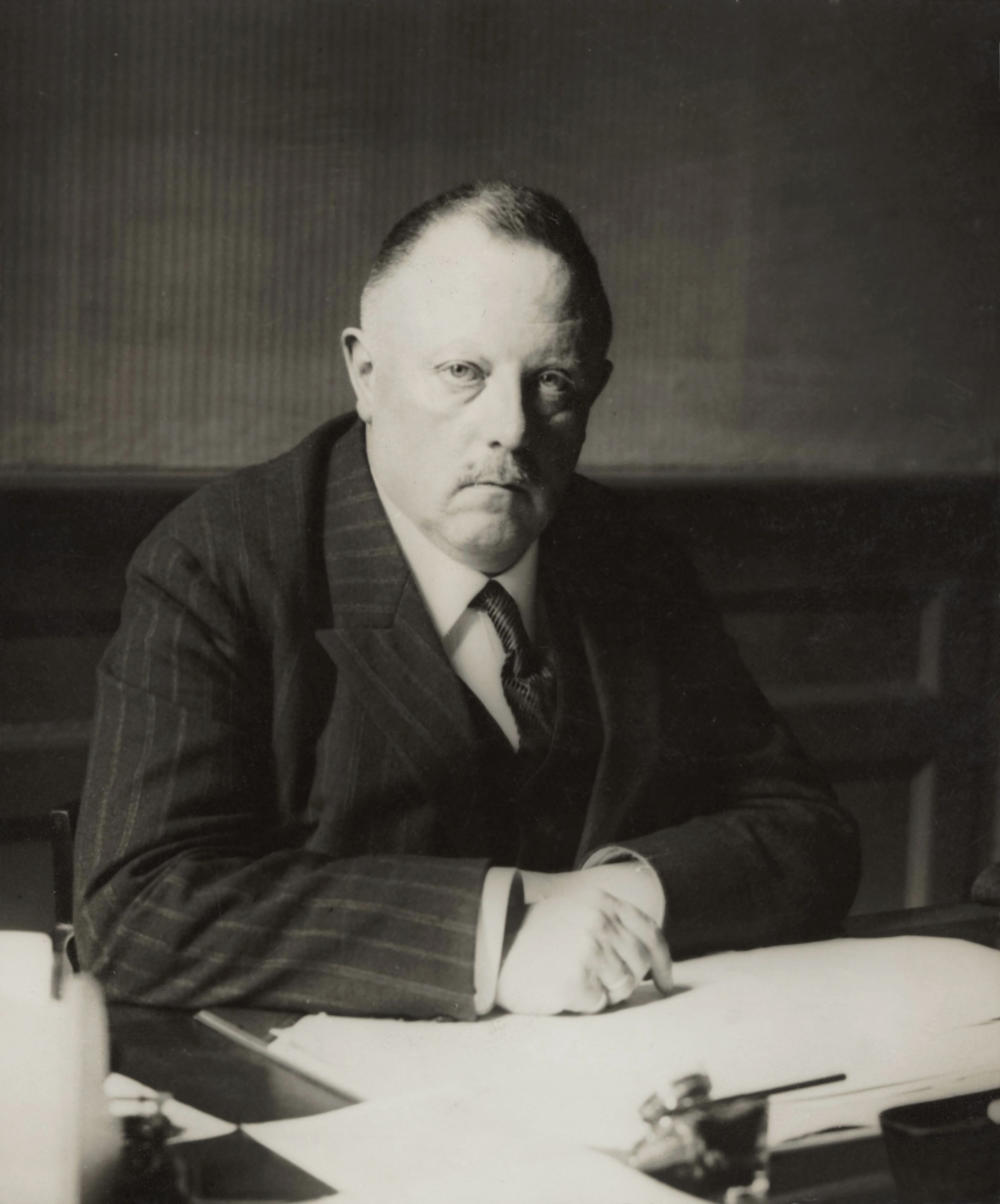 Prof. dr. W.H. Keesom, hoogleraar Natuurkunde en directeur van het Kamerlingh Onnes laboratorium in Leiden. is er als eerste in geslaagd om helium in de vaste fase te krijgen, door het bij hoge druk (150 bar) af te koelen.